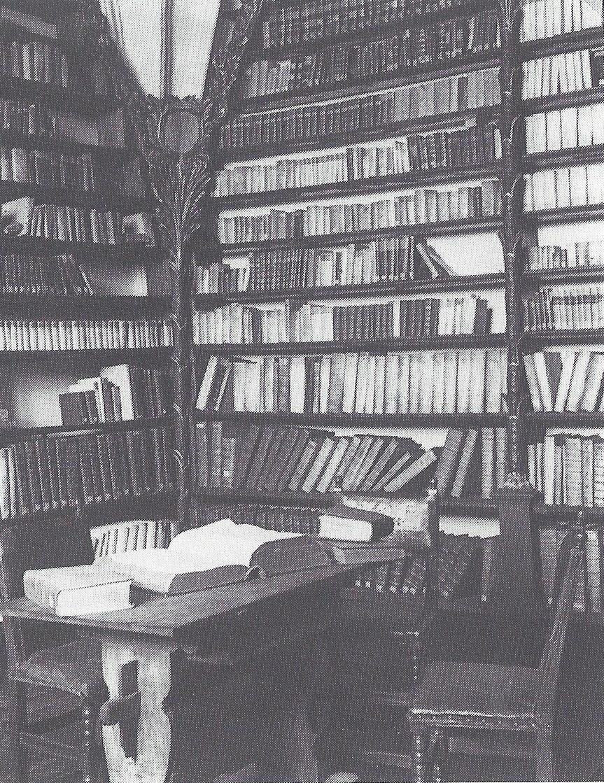 Wallenrodtsche Bibliothek im Südturm des Königsberger Doms